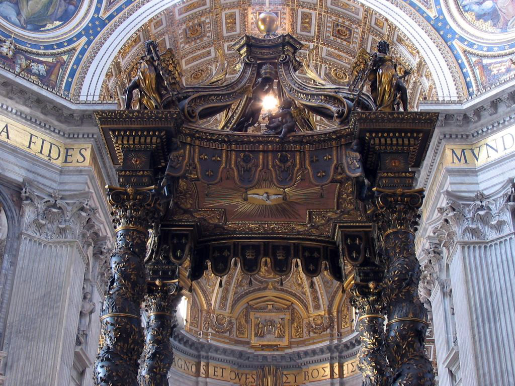 Baldachin über dem Petrusgrab im Petersdom in Rom. Vor diesem lag der Papst nach seinem Tod, um vom Volk Abschied zu nehmen; von Gian Lorenzo Bernini.